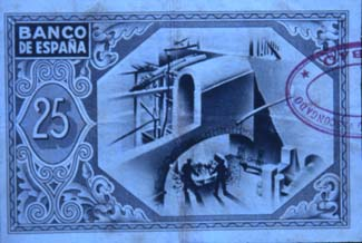 Eusko jaurlaritzaren diru billetea, 1937. urtekoa, Nikolas Martinez Ortiz de Zaratek egina.